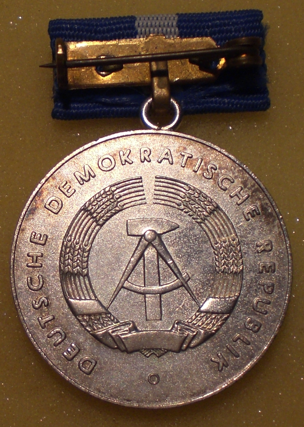 Revers der Lebensrettungsmedaille der DDR in der zweiten Form